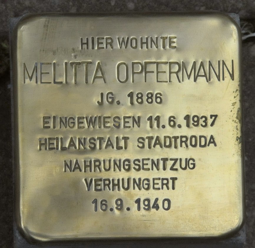 Stolperstein für Melitta Opfermann in Straußfurt, Bahnhofstr. 7 (ehem. Nr. 5)